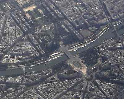 La Tour Eiffel et le Palais de Chaillot à Paris vus d'avion